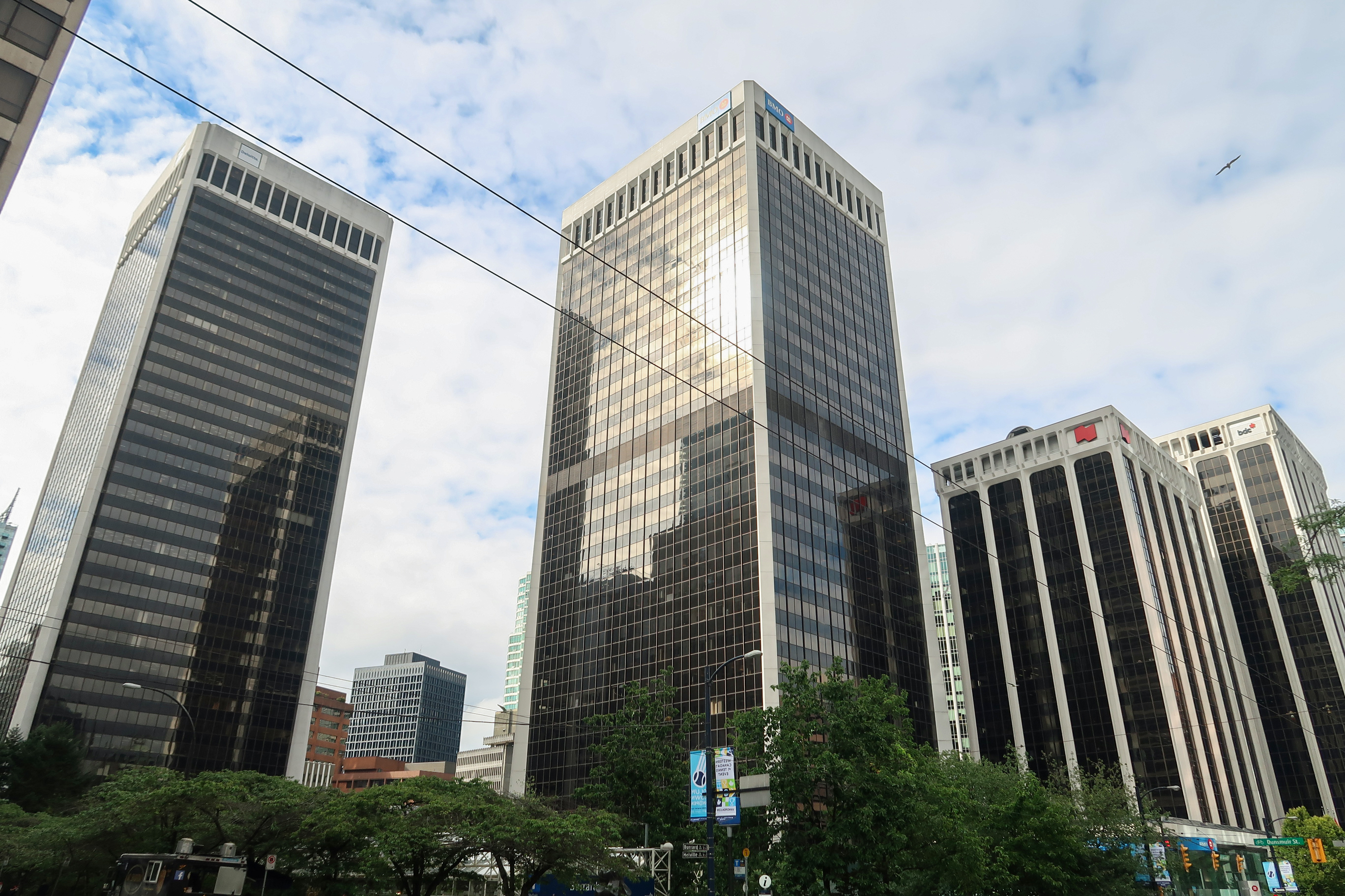 Bentall Centre